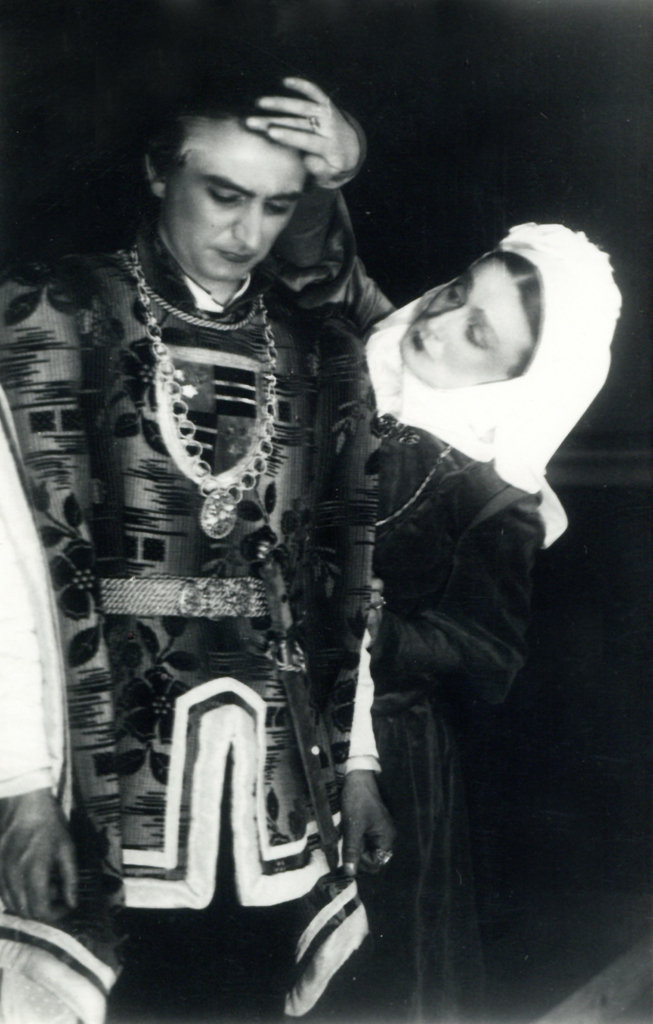 Oton Župančič, Veronika Deseniška, Narodno gledališče v Mariboru. Na fotografiji: Rado Nakrst (Friderik II.), Elvira Kralj (Veronika).